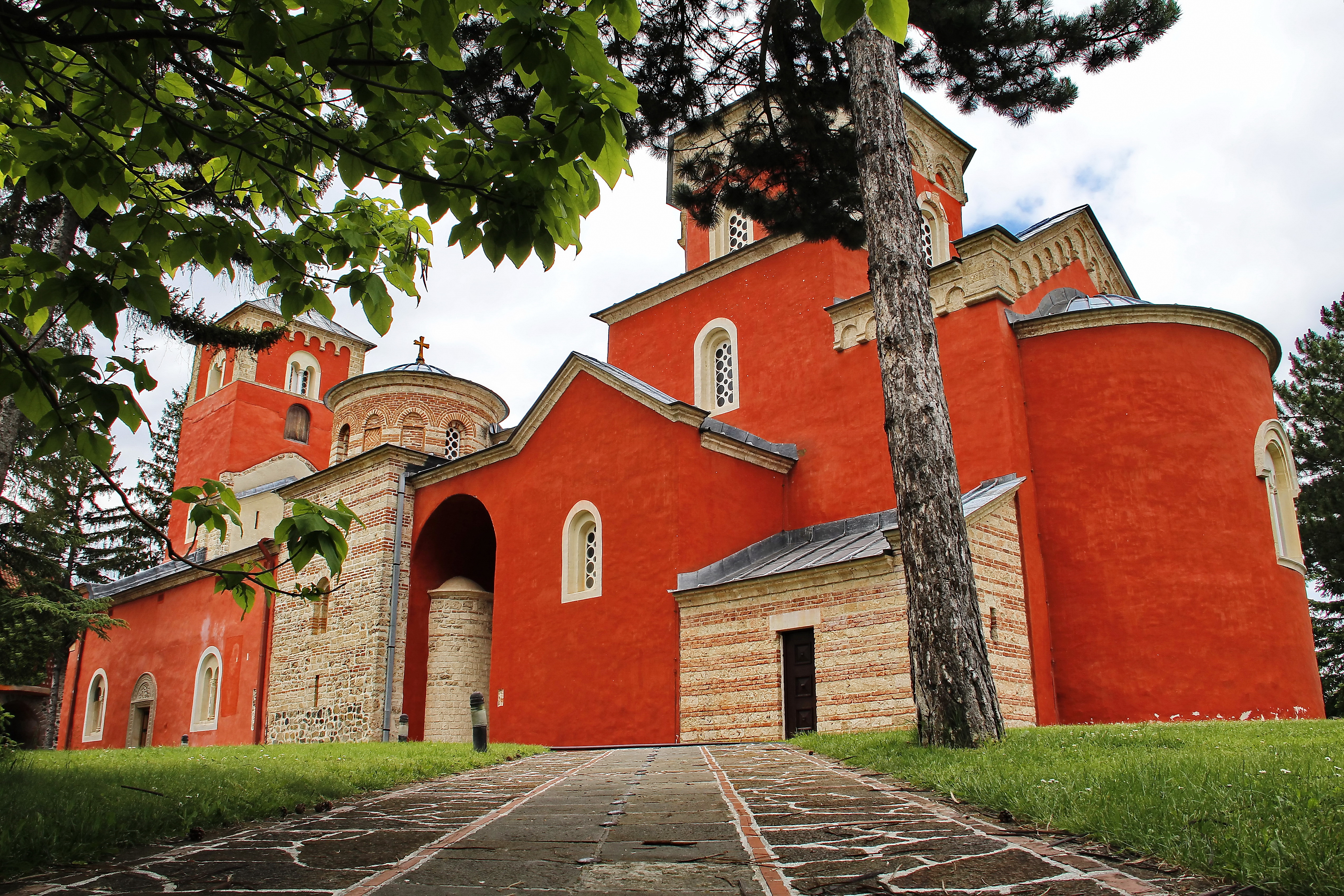 Žiča je srpski srednjovekovni manastir iz prve polovine XIII veka, a podigao ju je prvi kralj Srbije, Stefan Nemanjić.